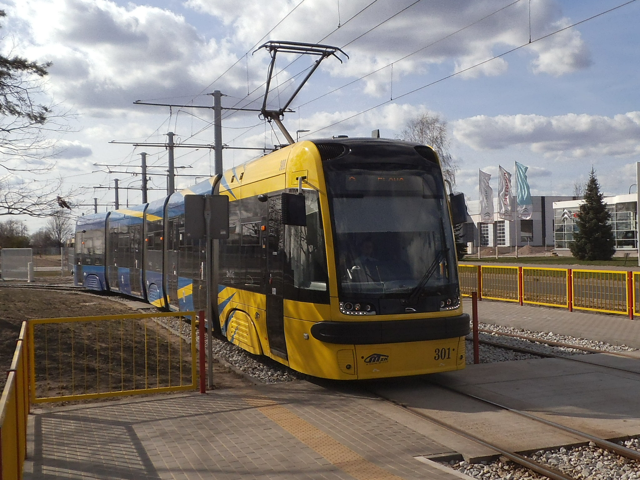 Swing-Toruń